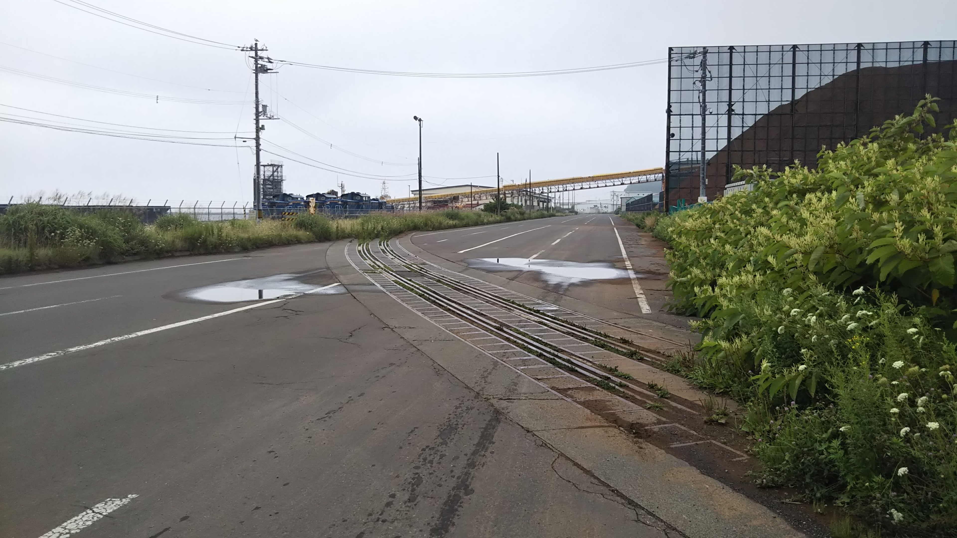 室蘭港崎守埠頭にある専用線の踏切